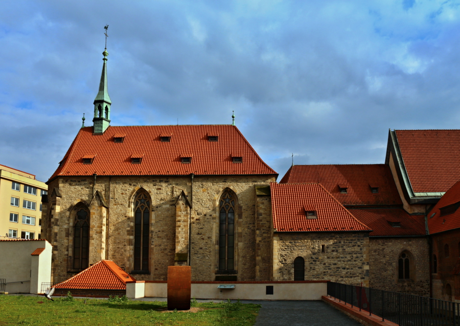 Anežský klášter